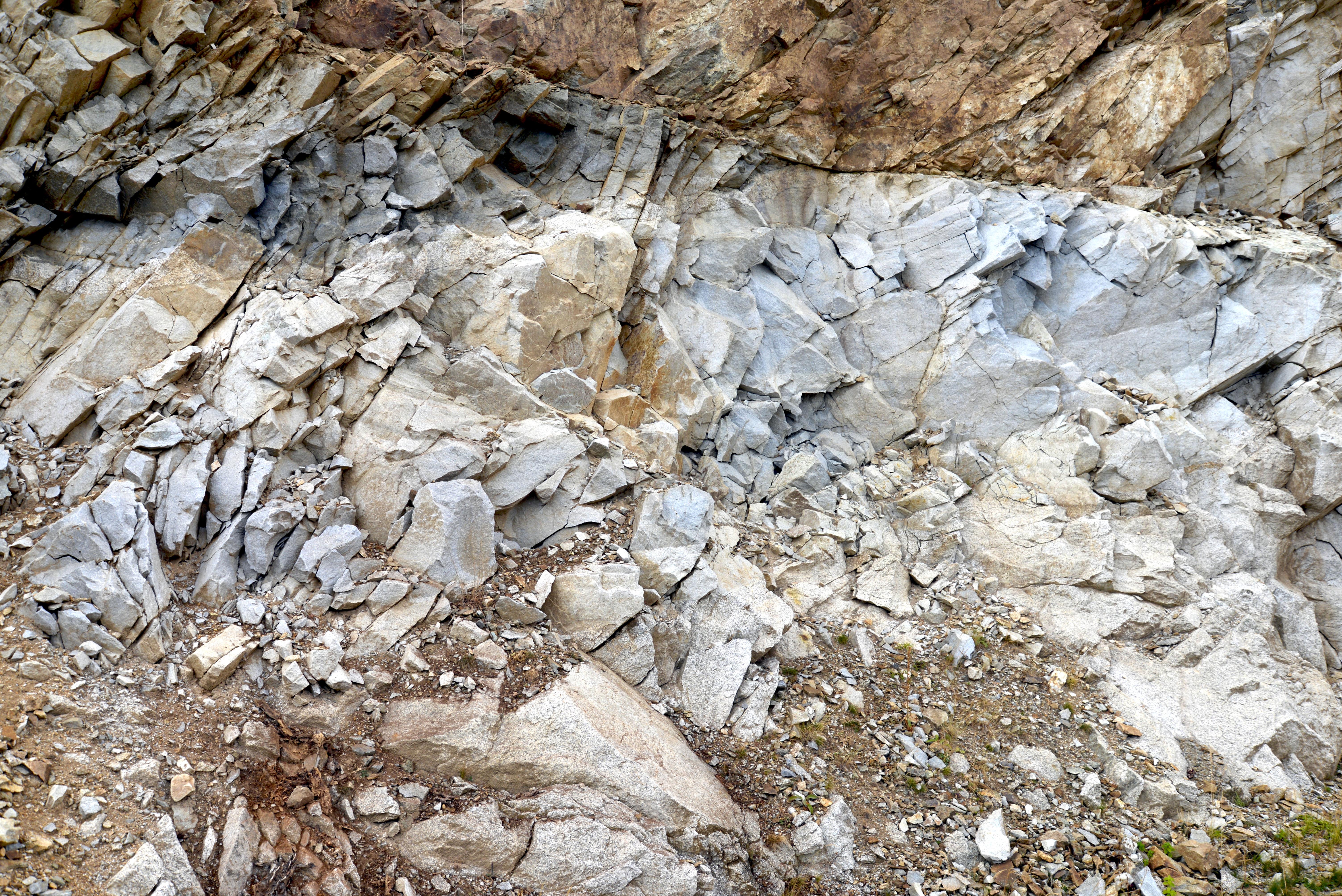 Muracciole, Centre Corse - Découpe de roche en bordure de la route D69 sous le col de Sorba